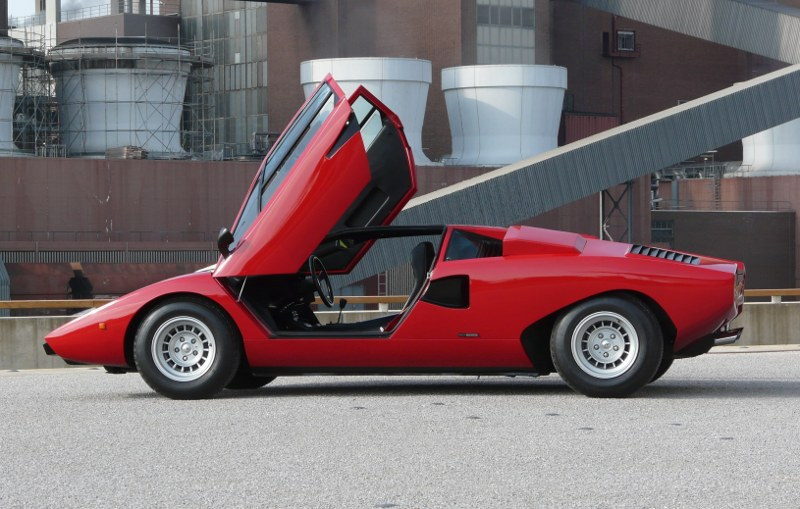 Lamborghini Countach mit geöffneten Scherentüren